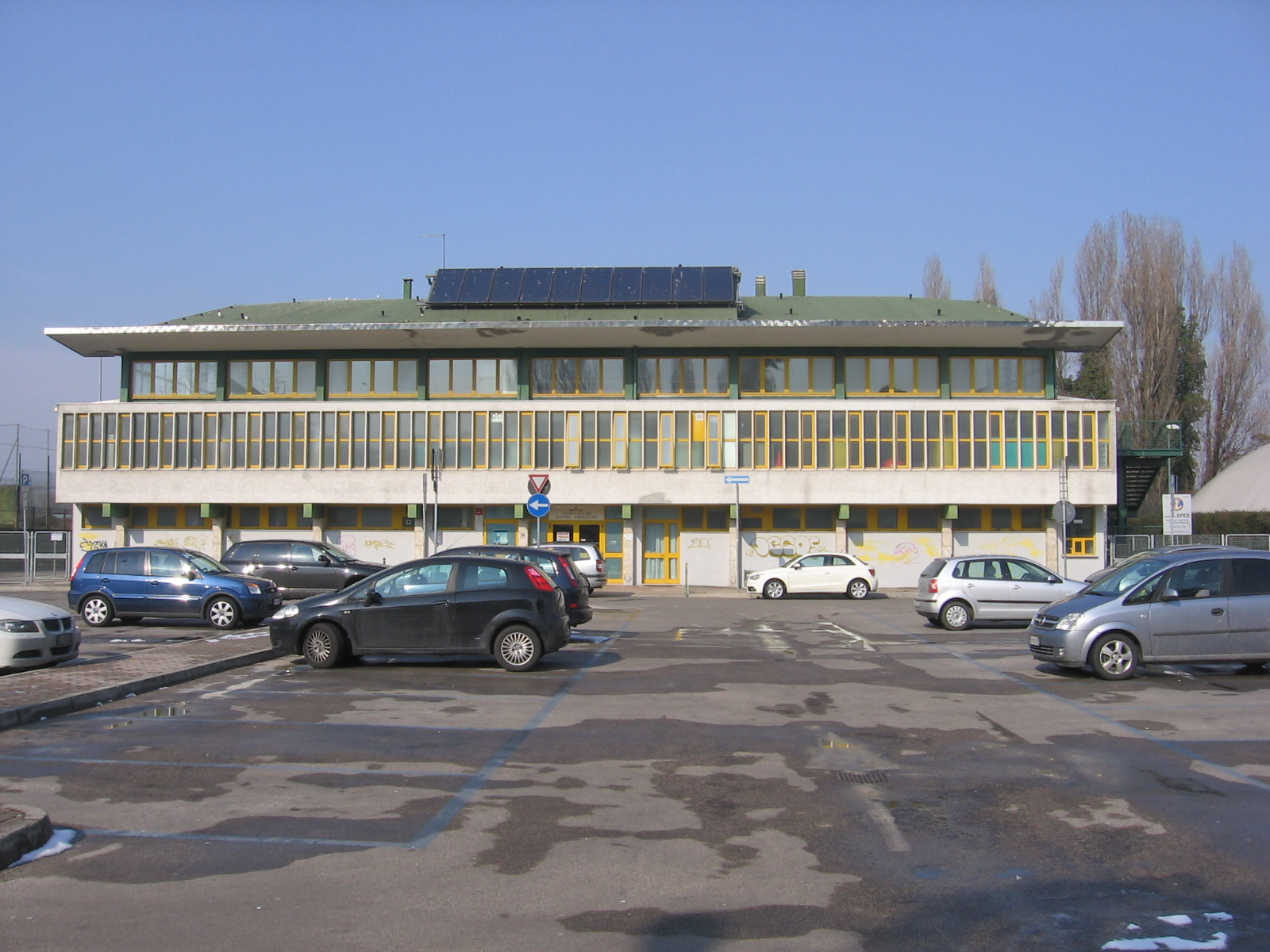 Mestre: il palasport Ancilotto, in via Olimpia. inizialmente chiamato "C.O.N.I.", fu dedicato al cestista campione mestrino Davide Ancilotto.